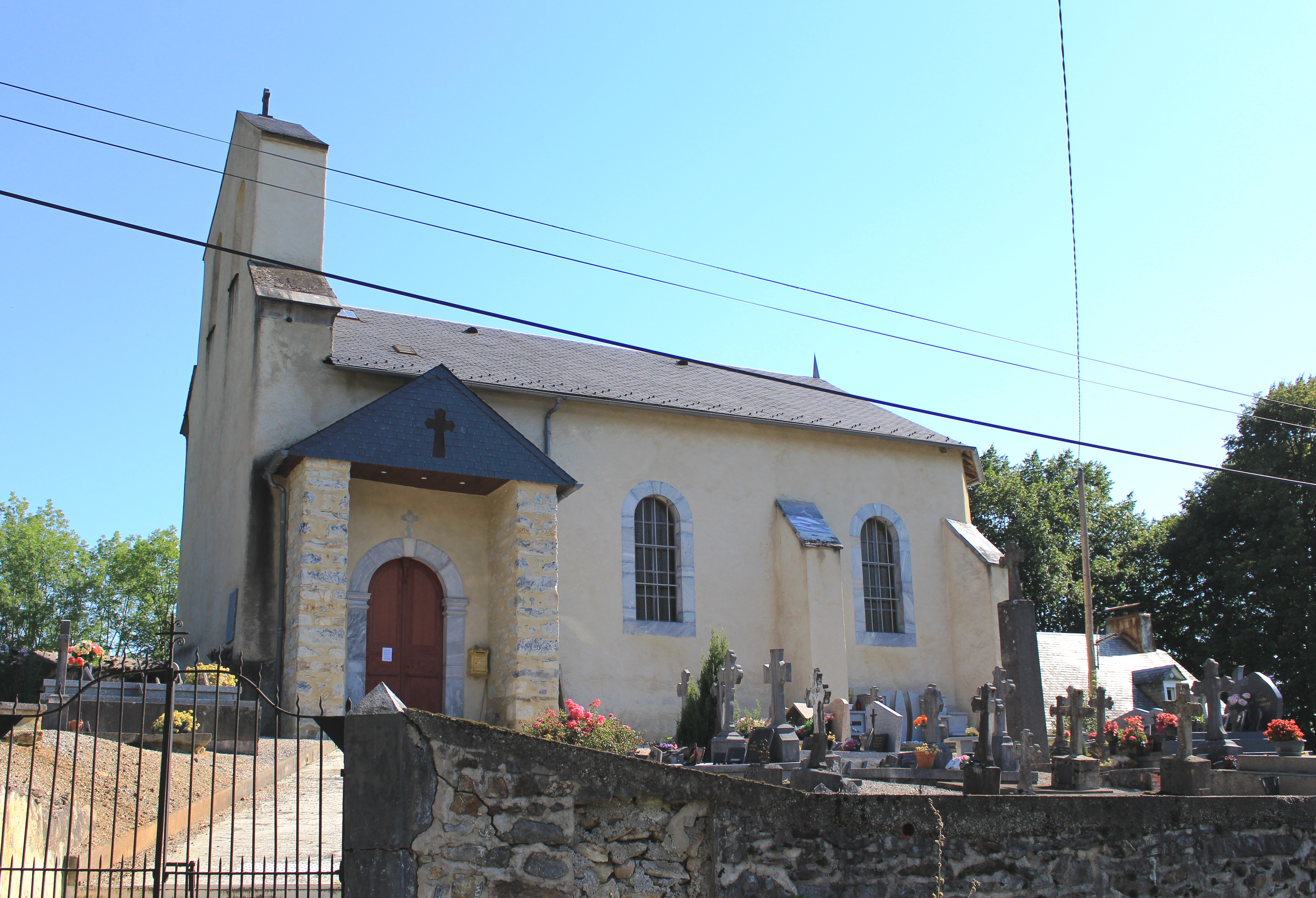 Église Saint-Pierre de Fréchendets (Hautes-Pyrénées)